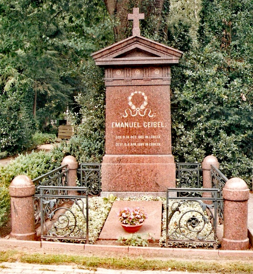 Lübecker Ehrenfriedhof; Grabmal Emanuel Geibel